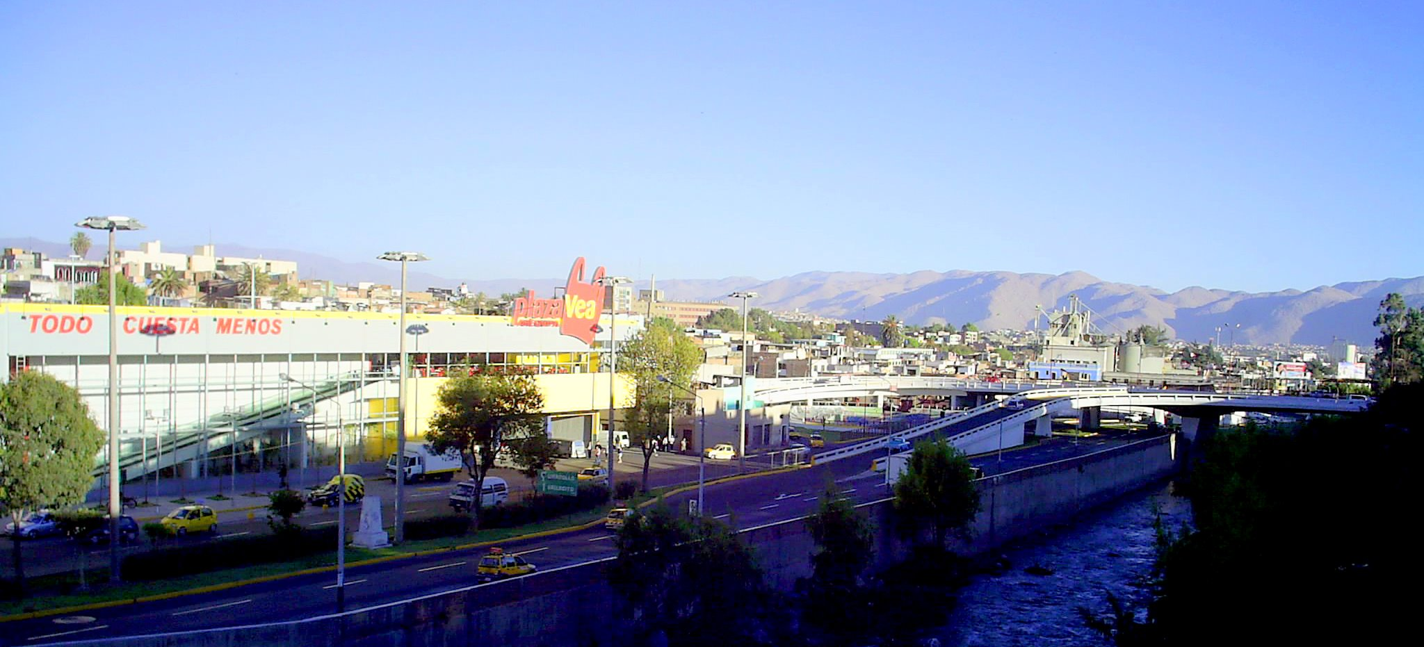 Av. La Marina una de la tantas vias modernas ubicadas en pleno centro de la ciudad de Arequipa, en la afueras del centro historico, un verdadero contraste de modernidad y cultura reconocida por las Naciones Unidas.